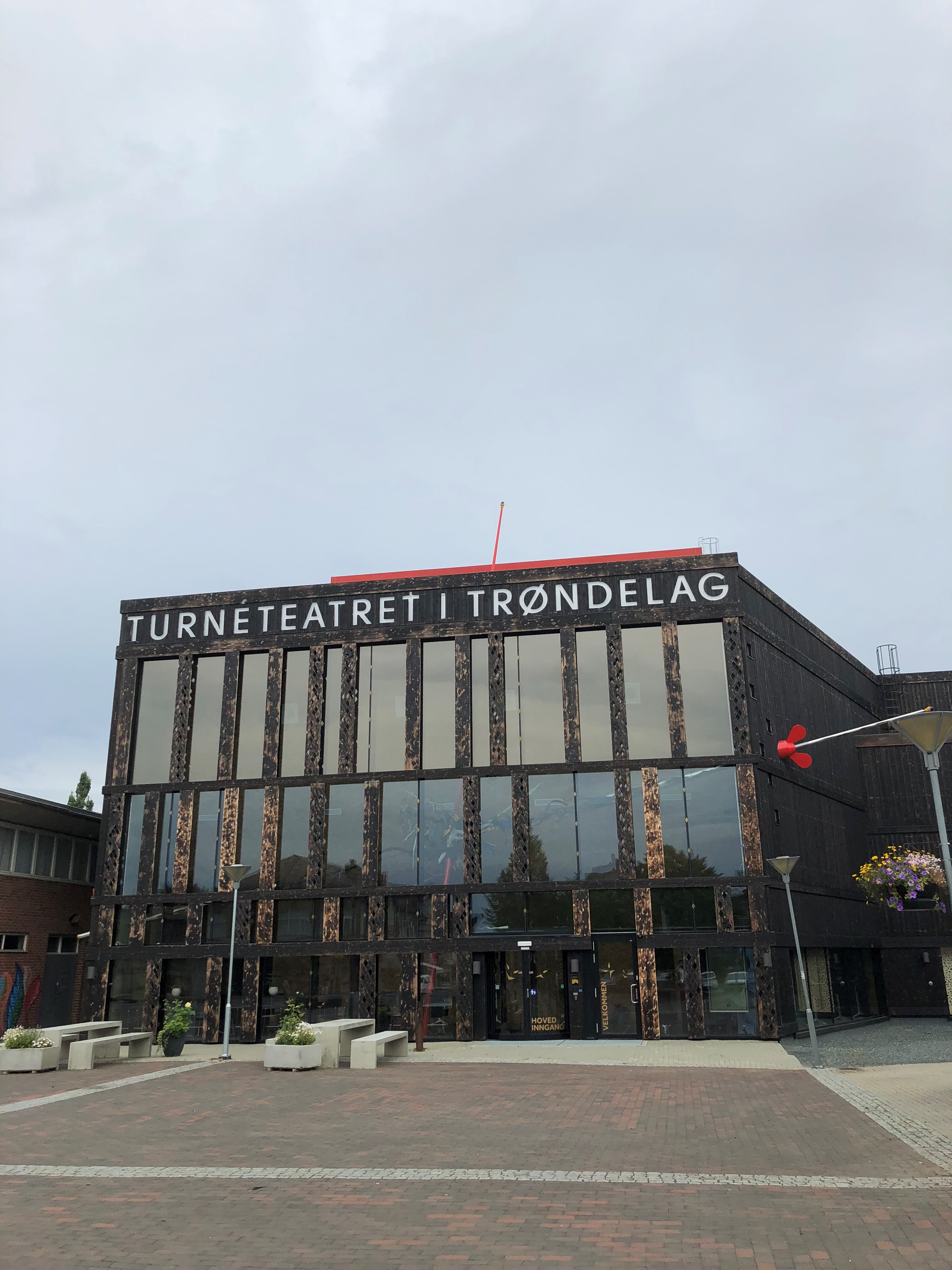 Fasaden og inngangspartiet til teaterbygget til Turnéteatret i Trøndelag], åpnet i 2017